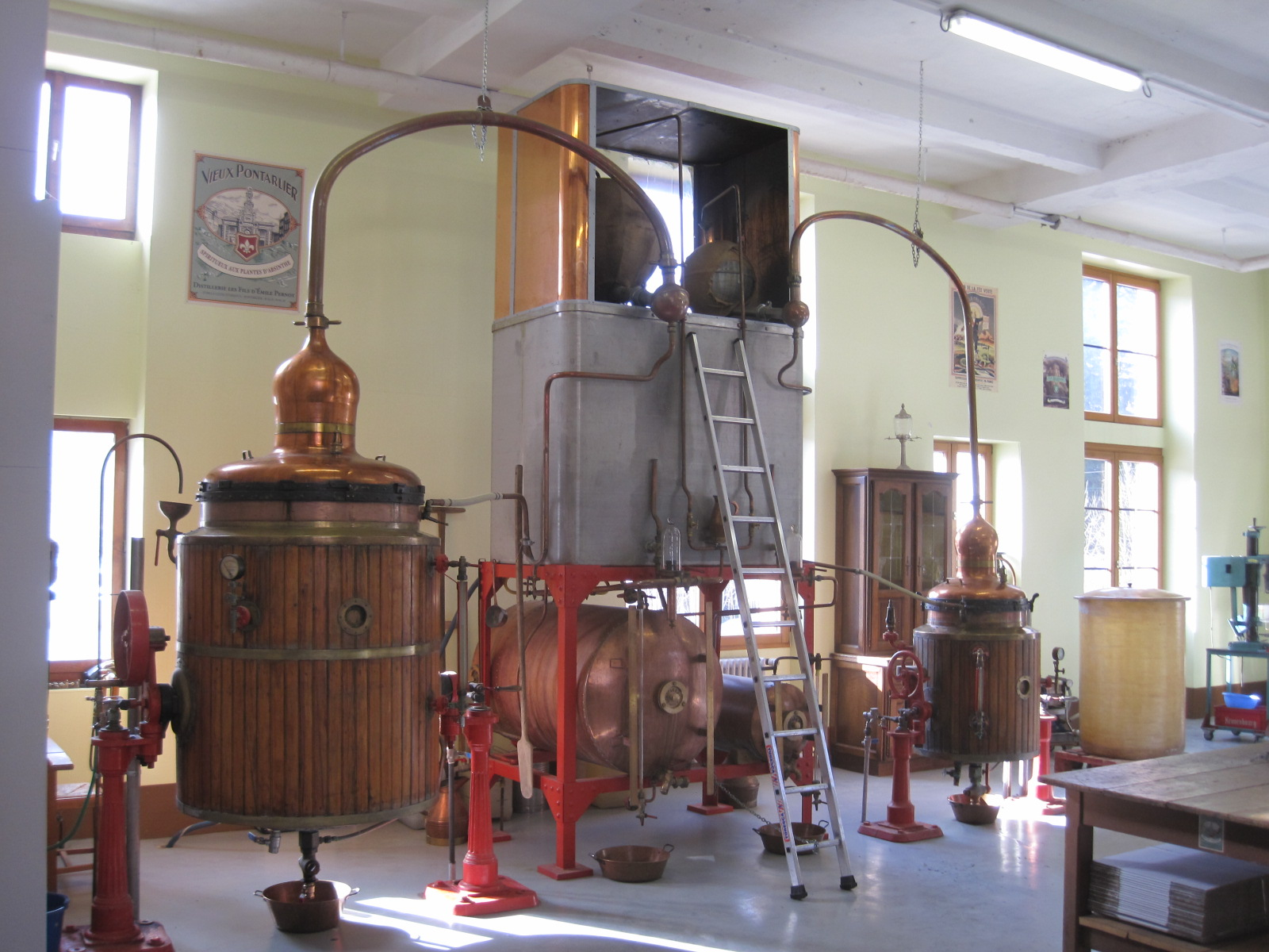 Distillerie les fils d'Émile Pernot, alambic traditionnelle en cuivre